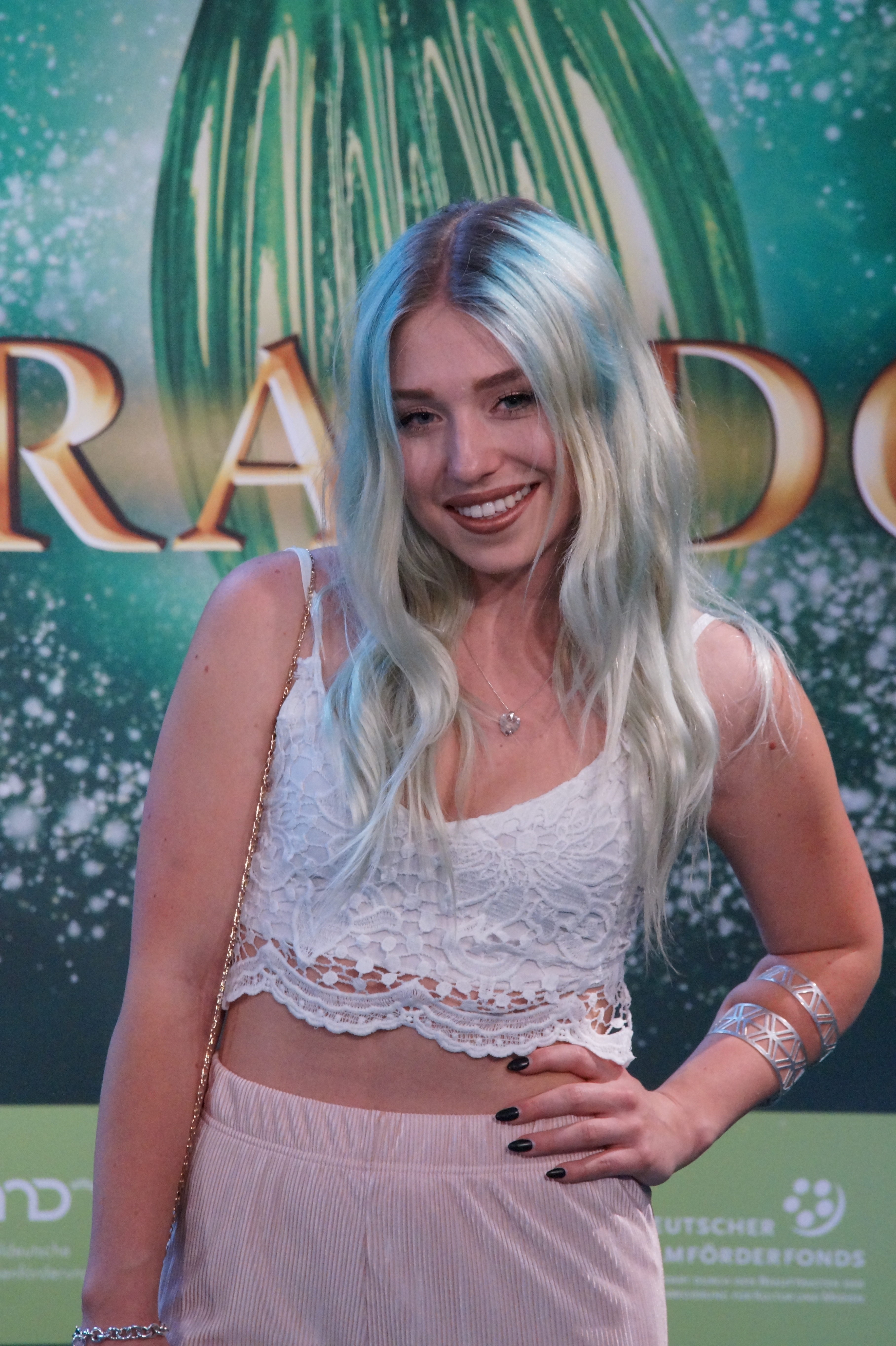 Bianca „Bibi“ Heinicke von „BibisBeautyPalace“ bei der Deutschlandpremiere von 'Samaragdgrün', Köln, Juni 2016.